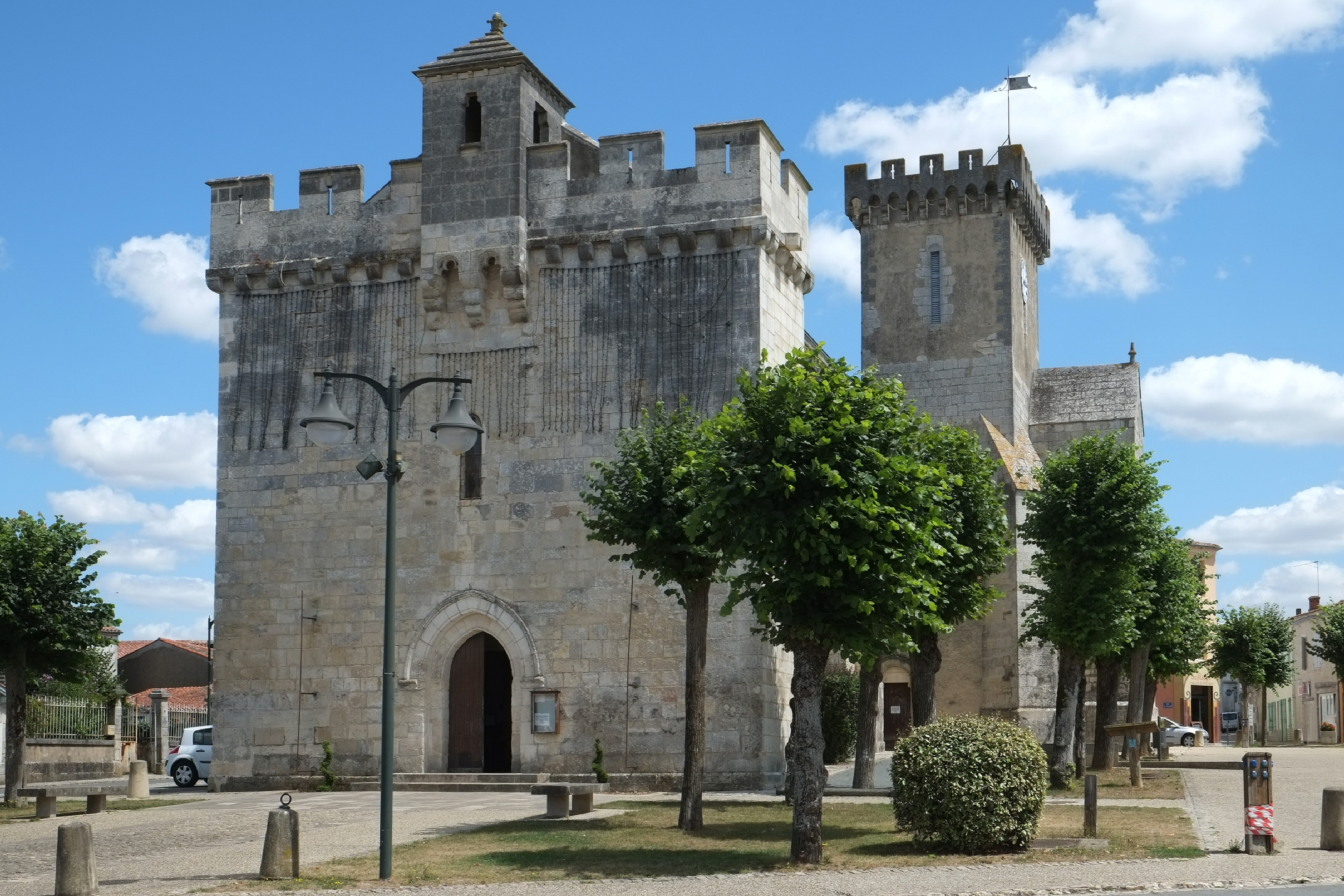 Église Notre-Dame Courçon Charente-Maritime France